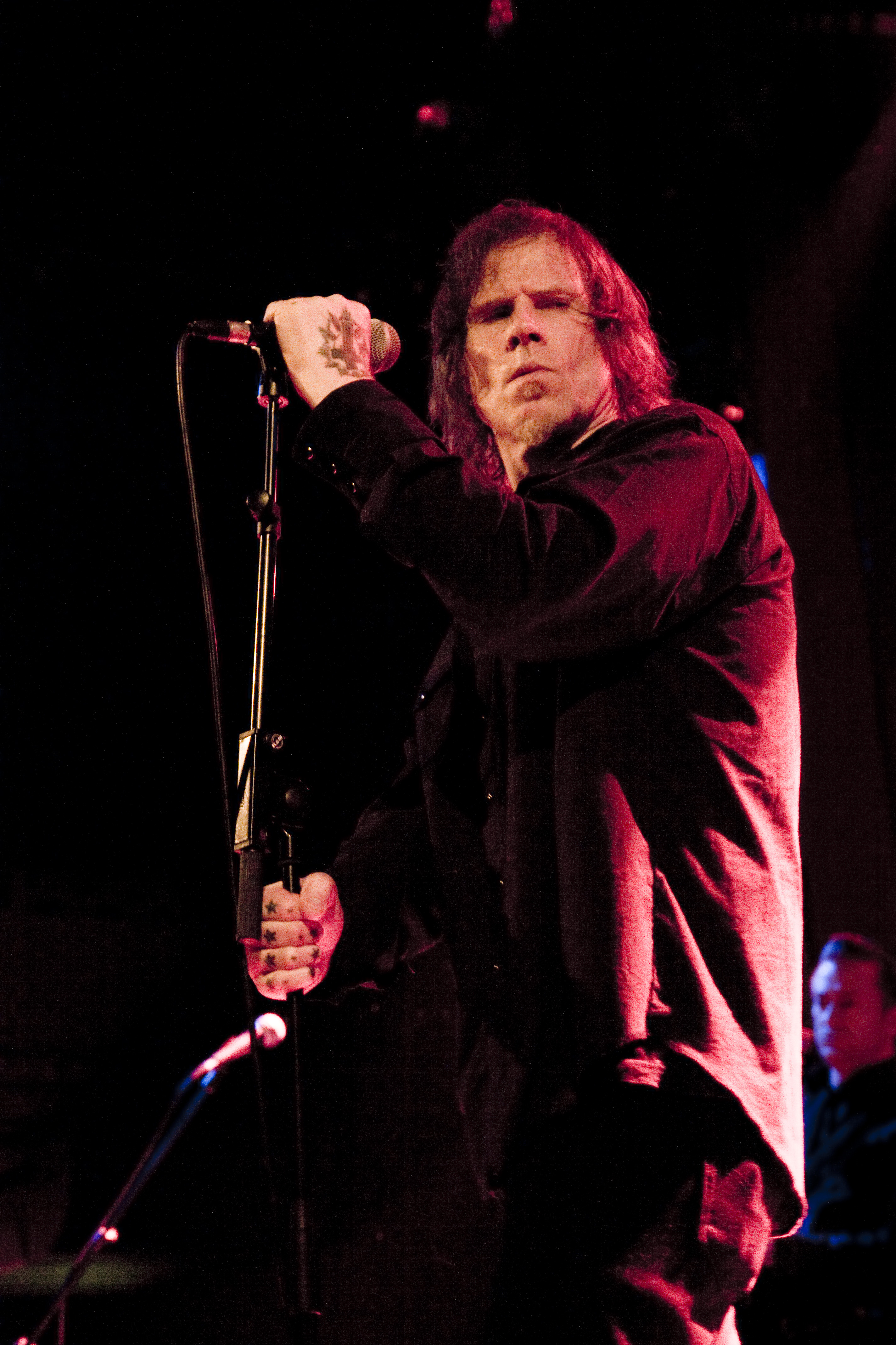 Марк Ланеган, концерт в Sala Apolo, Барселона